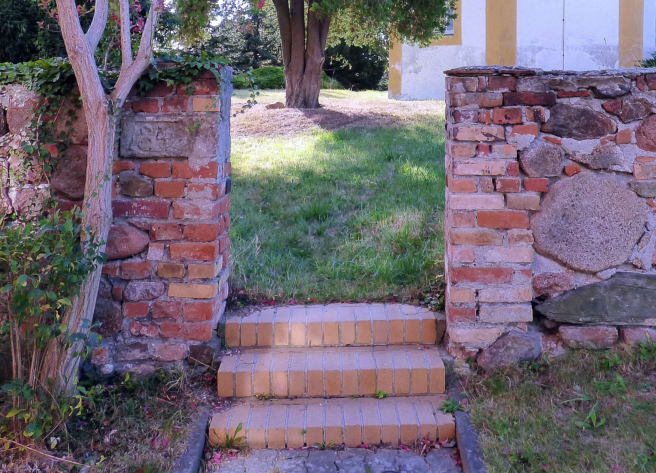 Dorfkirche Dreska